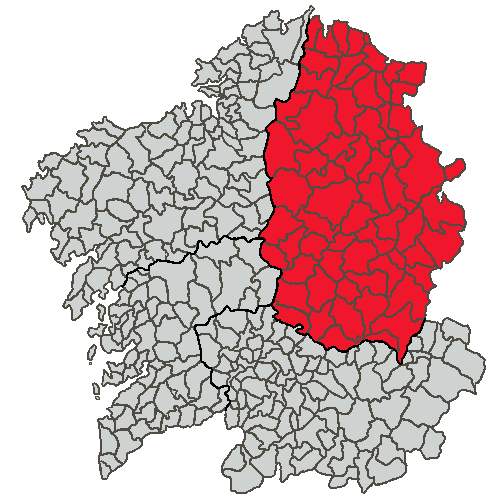 Mapa coa localización da Provincia de Lugo.